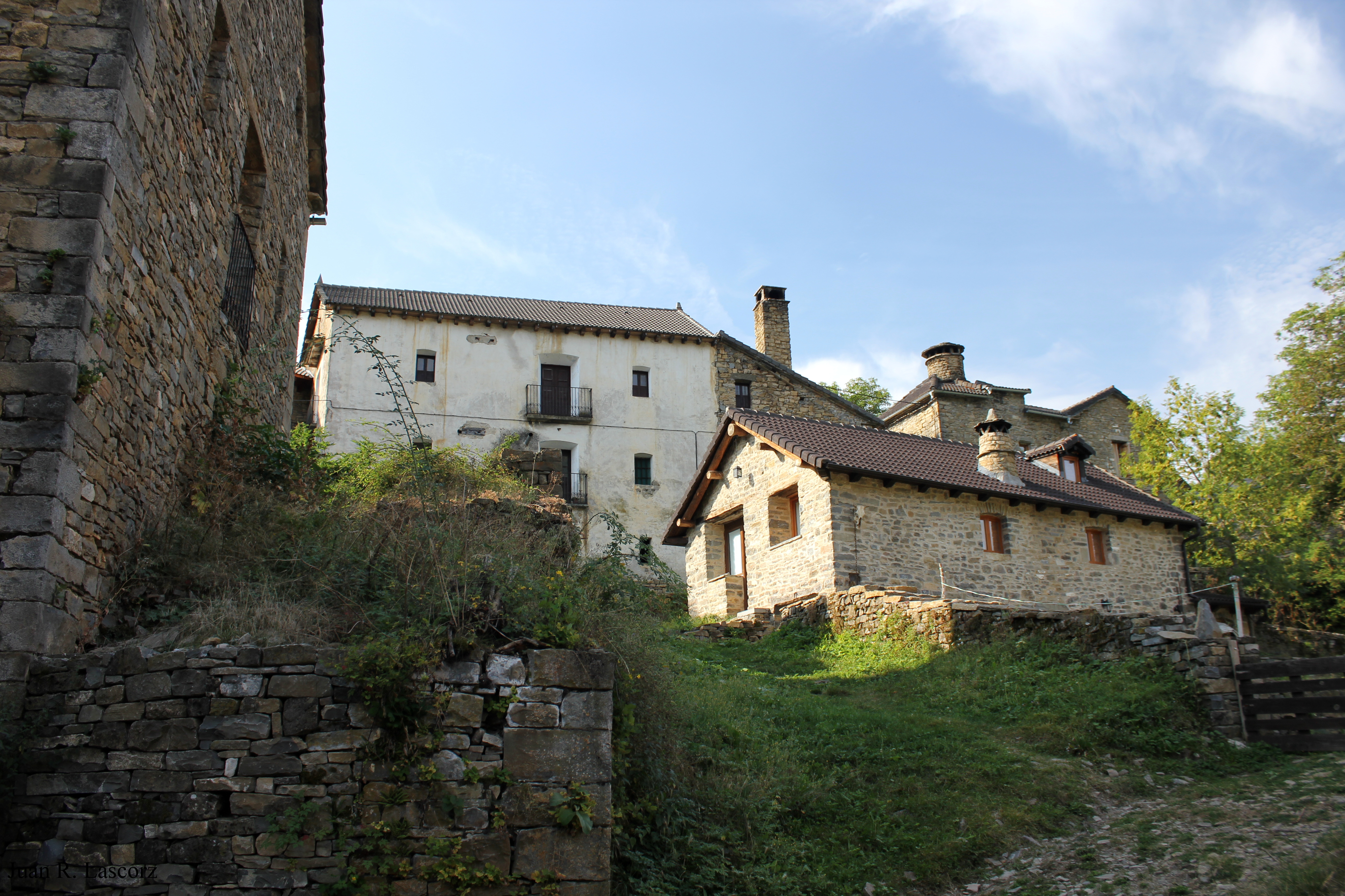 Aragonés: Casas en Bergua.